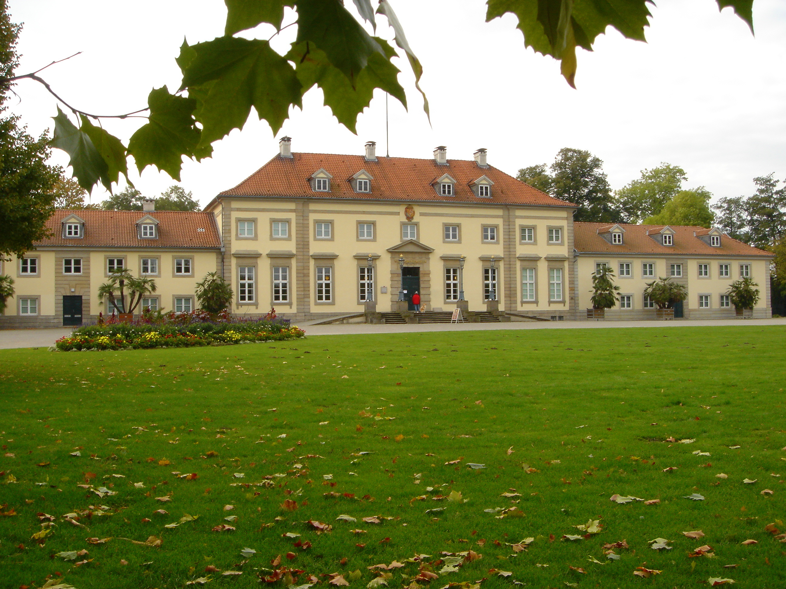 Wilhelm Busch – Deutsches Museum für Karikatur und Zeichenkunst im Georgenpalais